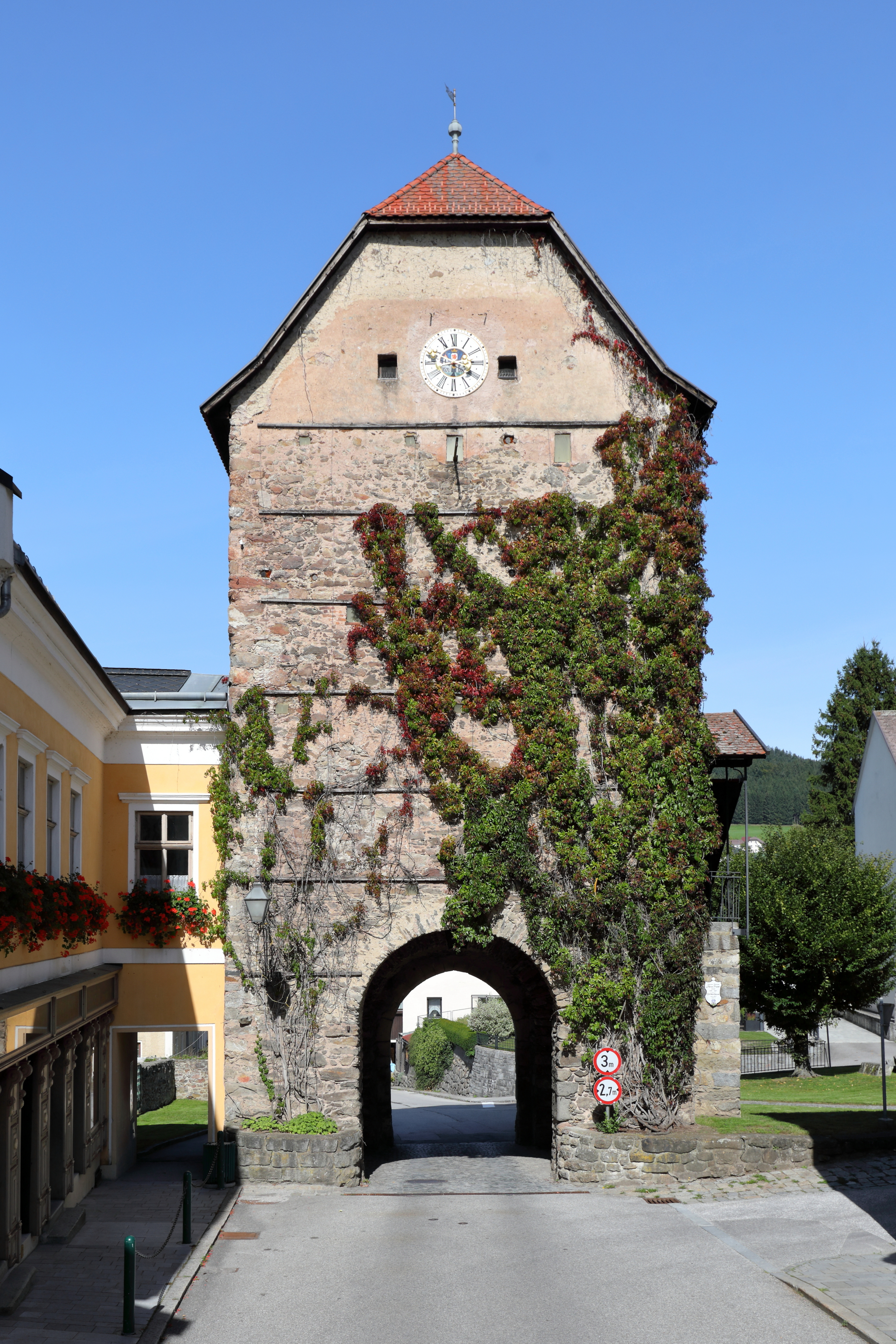 Der Untere Torturm bzw. "Alter Turm" in der oberösterreichischen Marktgemeinde Haslach an der Mühl.Der Untere Torturm stellte den ehemaligen nordwestlichen Zugang zum Markt dar. Er wurde von 1483 bis 1487 als Teil der annähernd rechteckige Wehranlage um den Markt Haslach errichtet. Seit 1927 dient er der Marktgemeinde als Heimathaus.